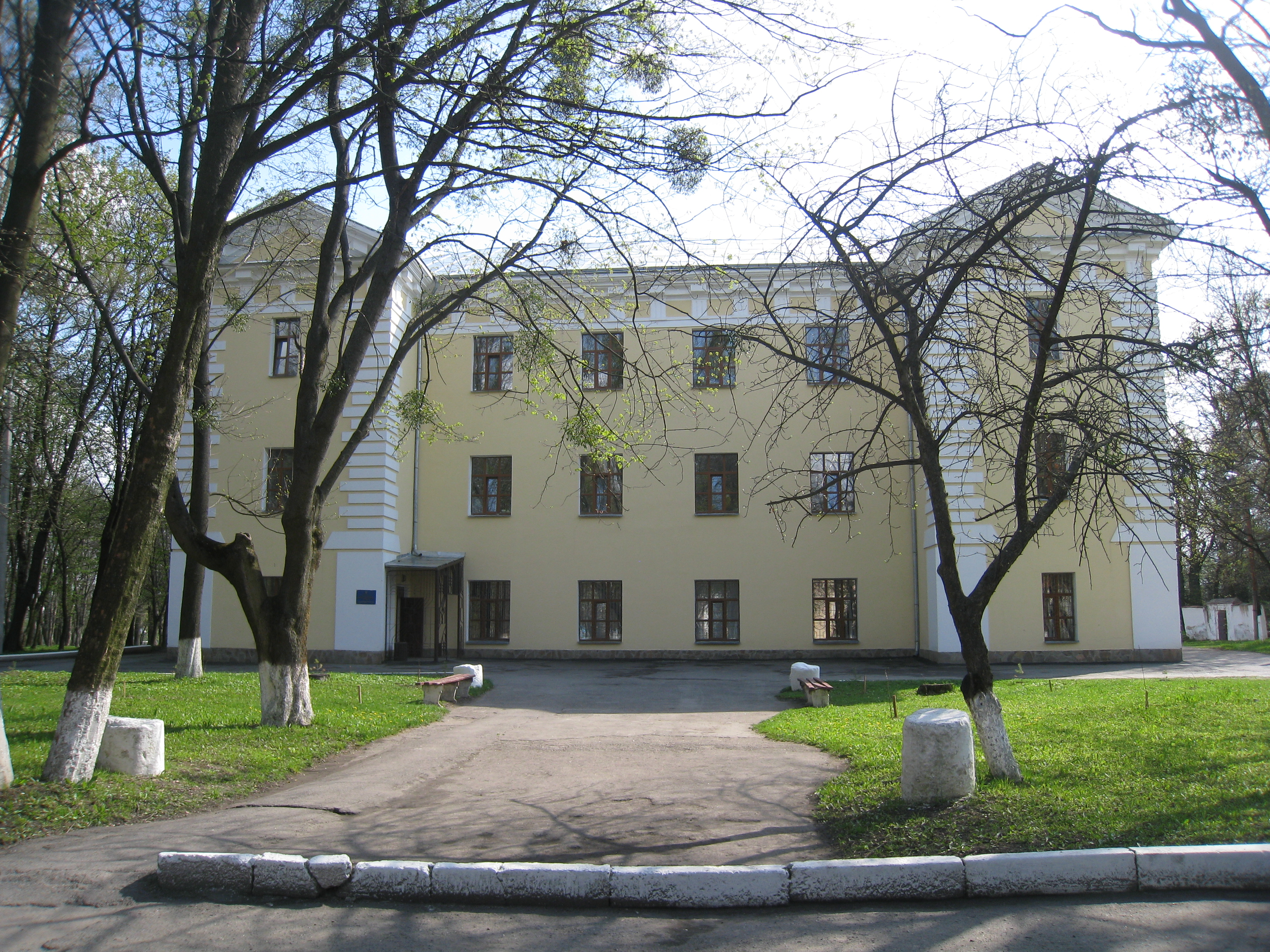 Вінницький обласний клінічний ендокринологічний диспансер. Адміністрація: Фасад